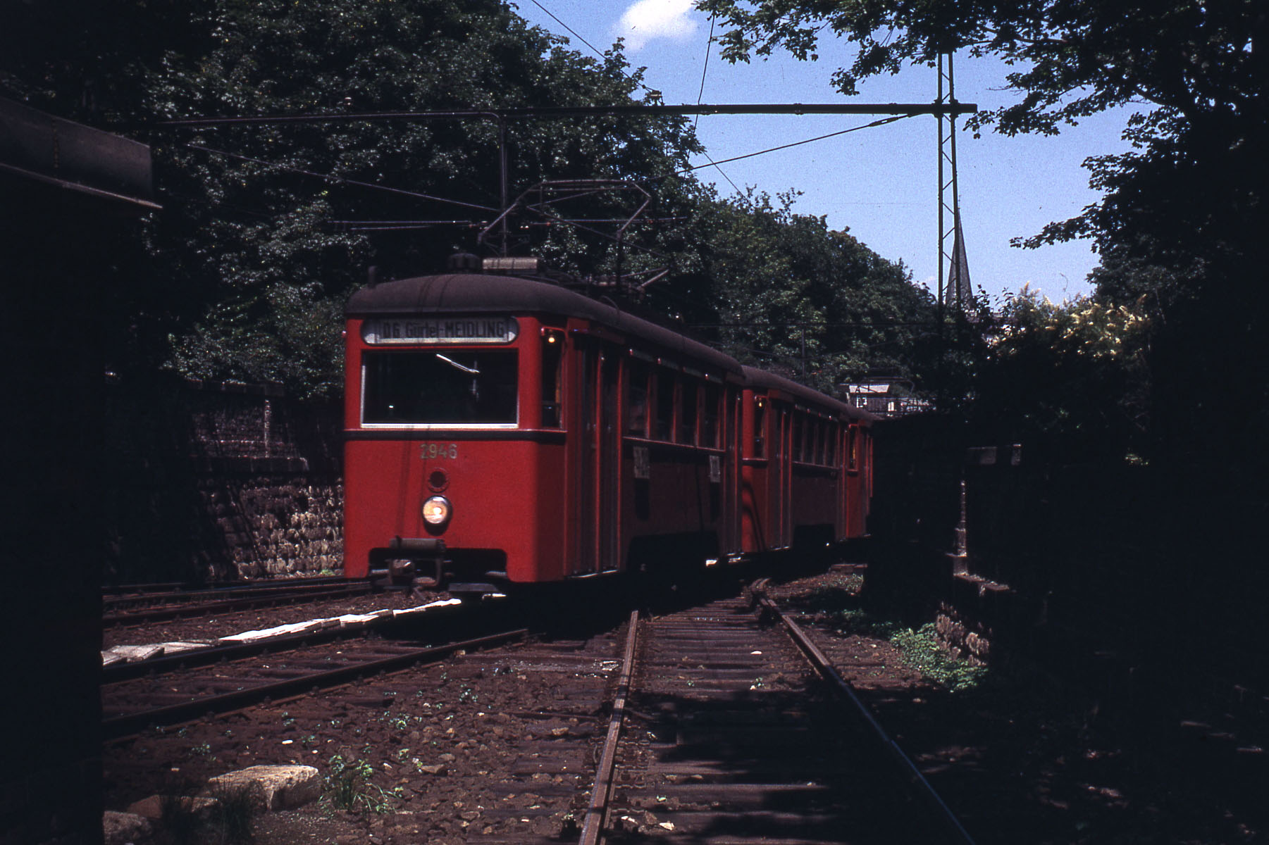 Linie DG, Gumpendorfer Straße. Im Vordergrund eines der Verbindungsgleise zur Straßenbahn.